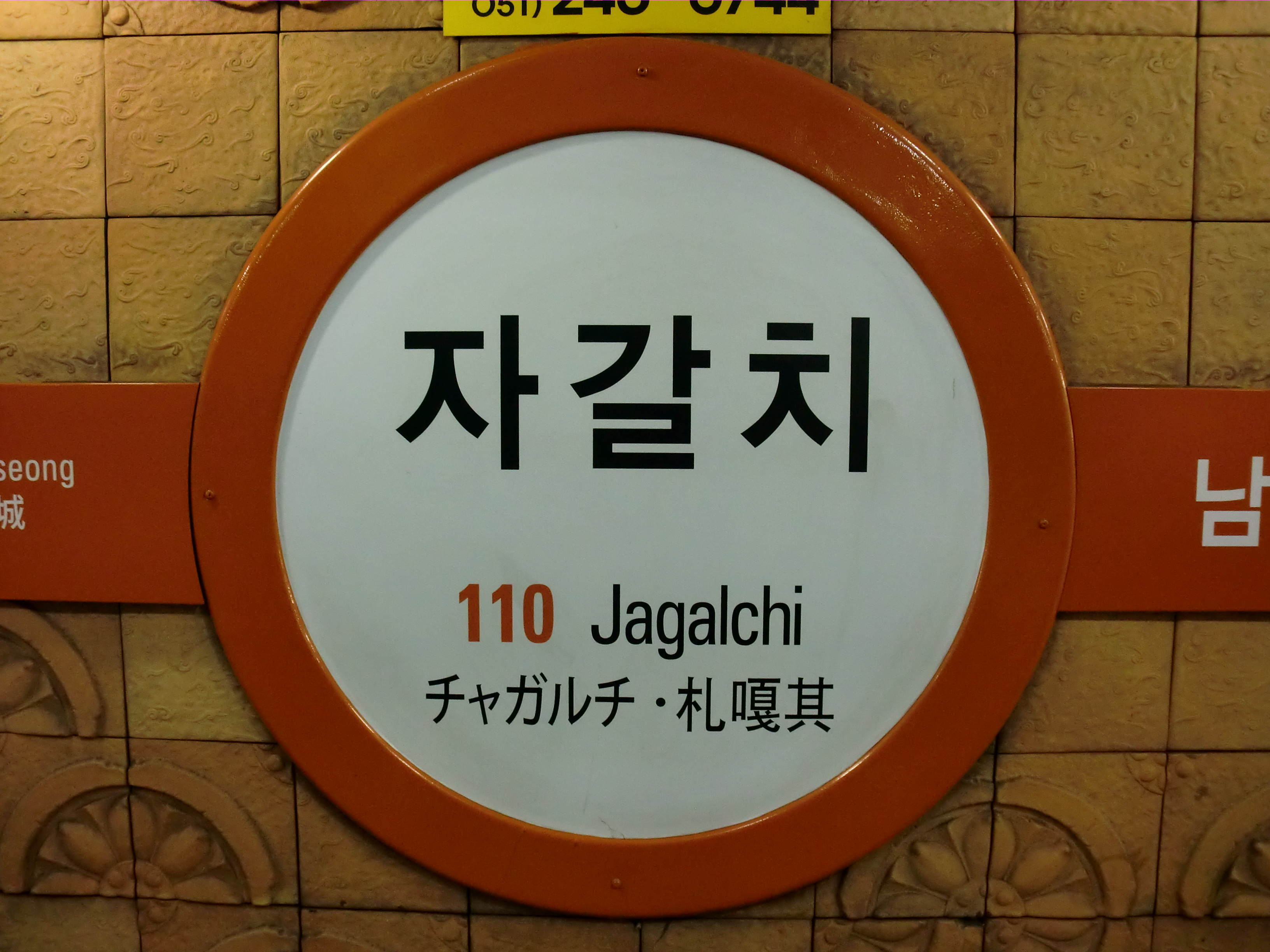 チャガルチ駅の駅名標（2010年改訂）